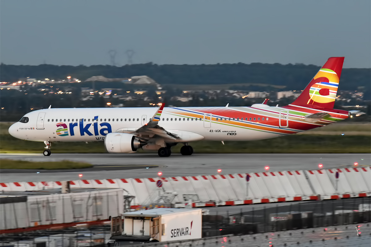 Arkia Israeli Airlines, 4X-AGK, Airbus A321-251NX